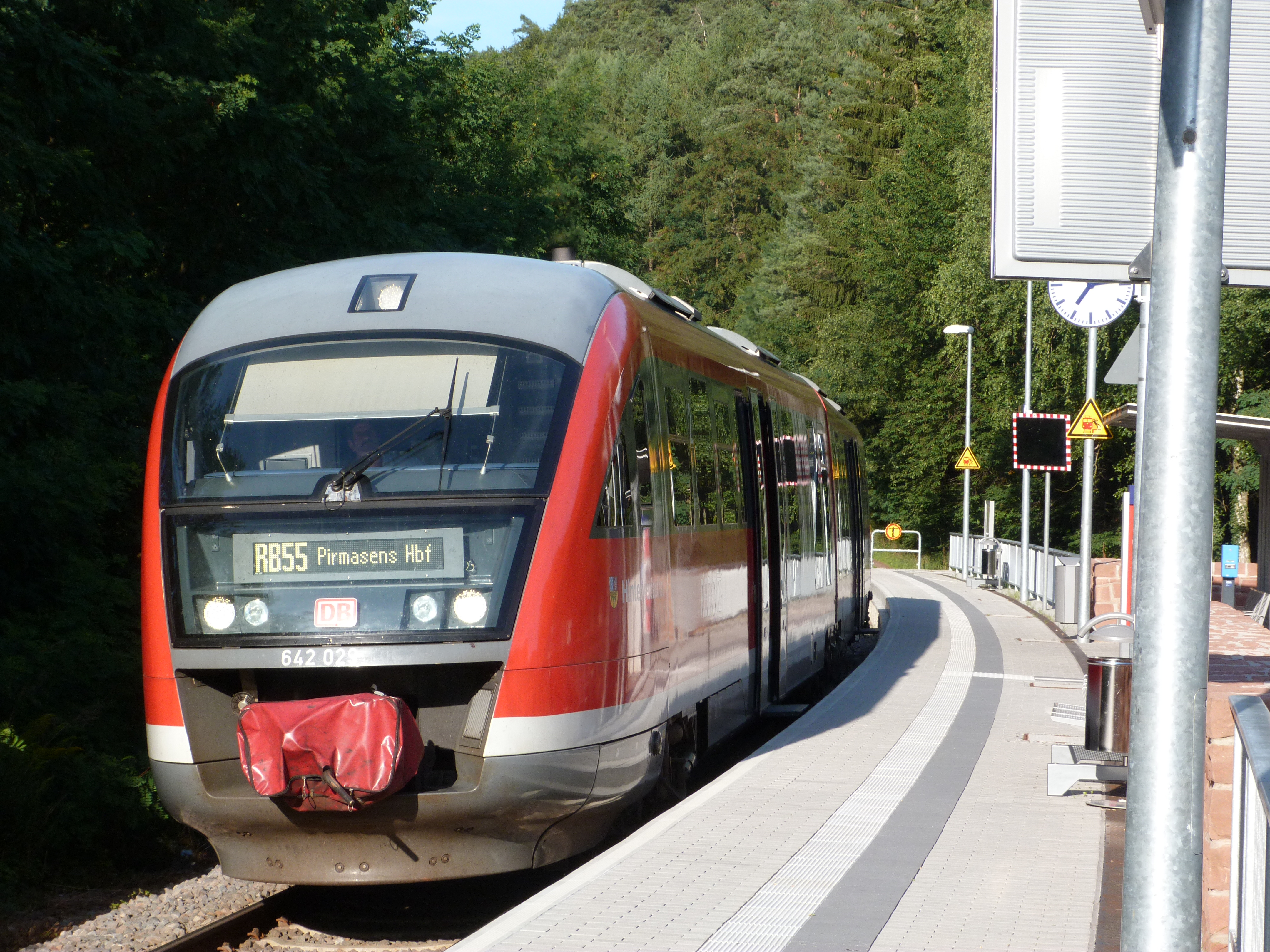 DB-Triebwagen 642 029/529 am 11.07.2011 am Haltepunkt Hauenstein Mitte